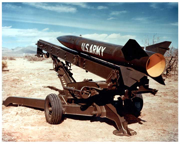 MGR-3 Little John (XM47)